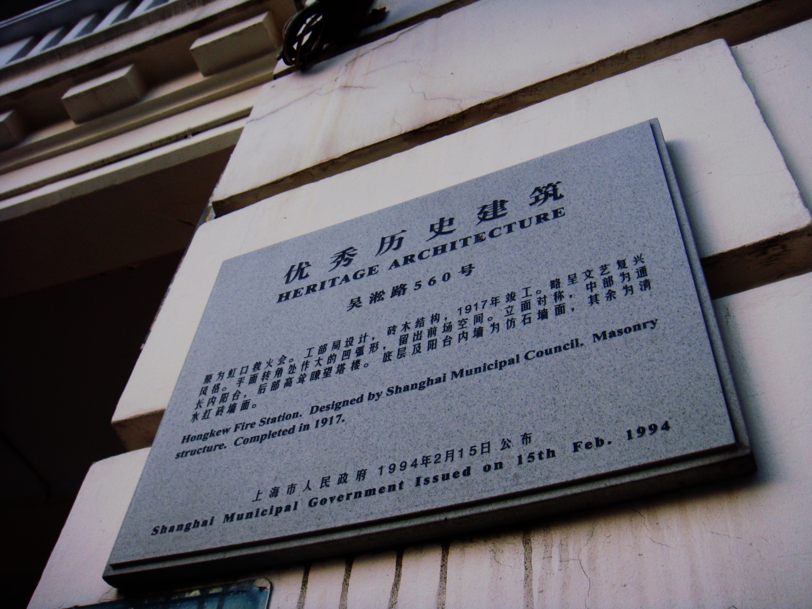 虹口救火会铭牌